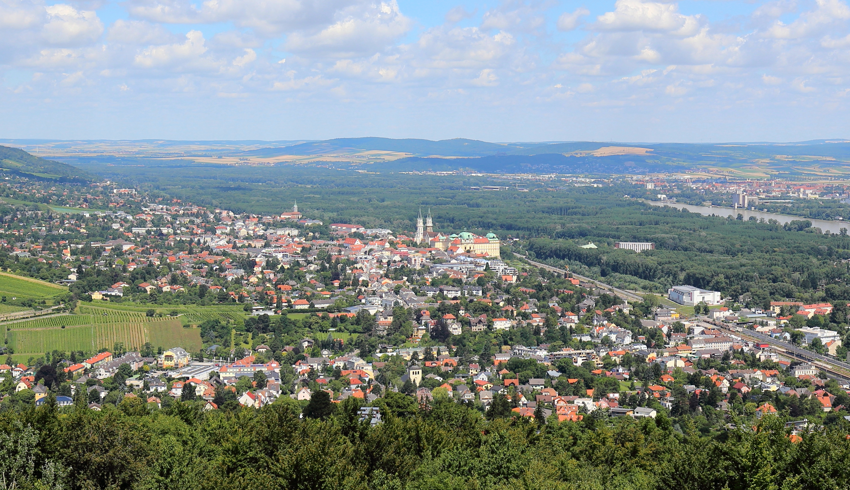 Südansicht der niederösterreichischen Stadt Klosterneuburg. Rechts im Hintergrund die Donau und die Stadt Korneuburg.